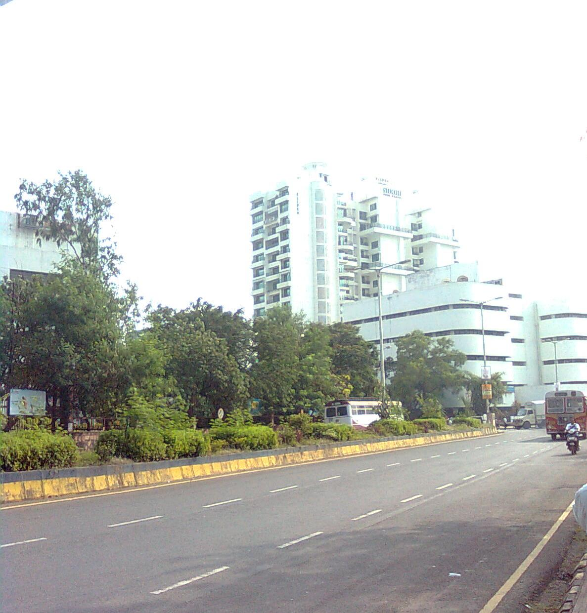 बेलापुर